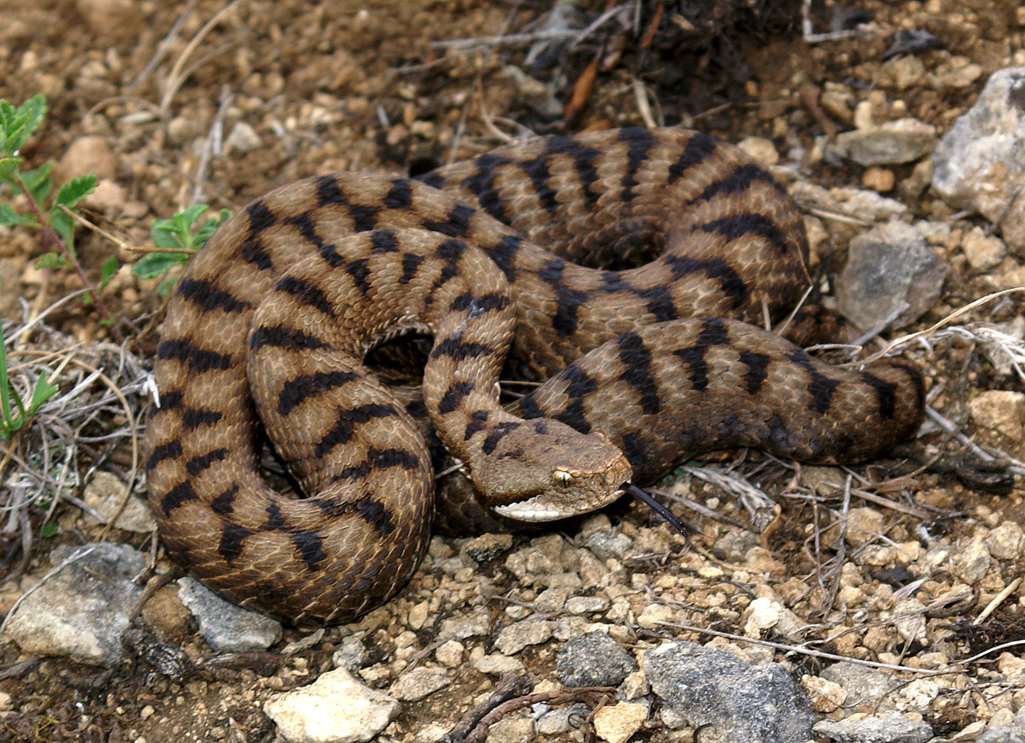 Vipera aspis female - adult